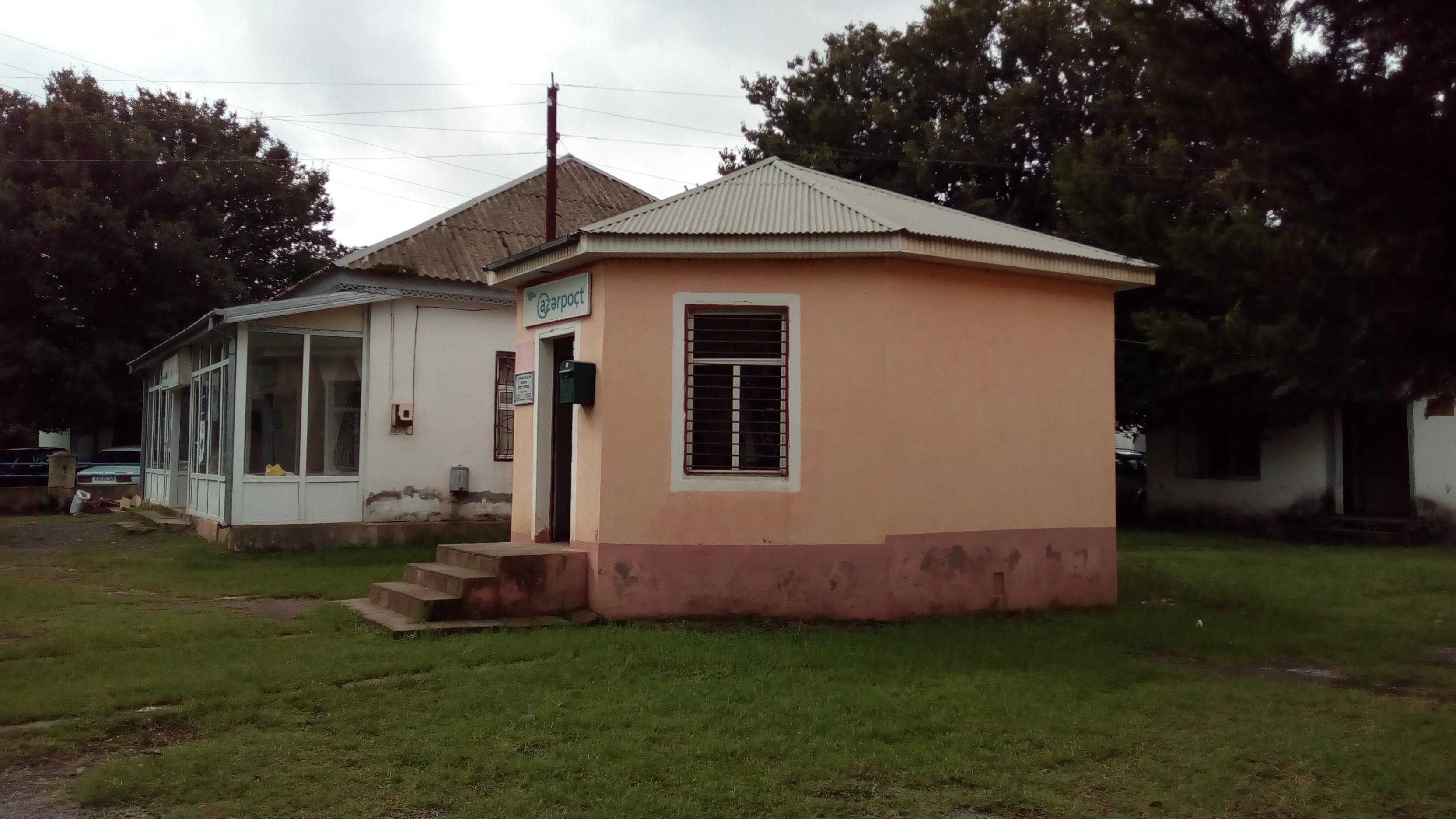 Astara rayonunun Maşxan kəndi